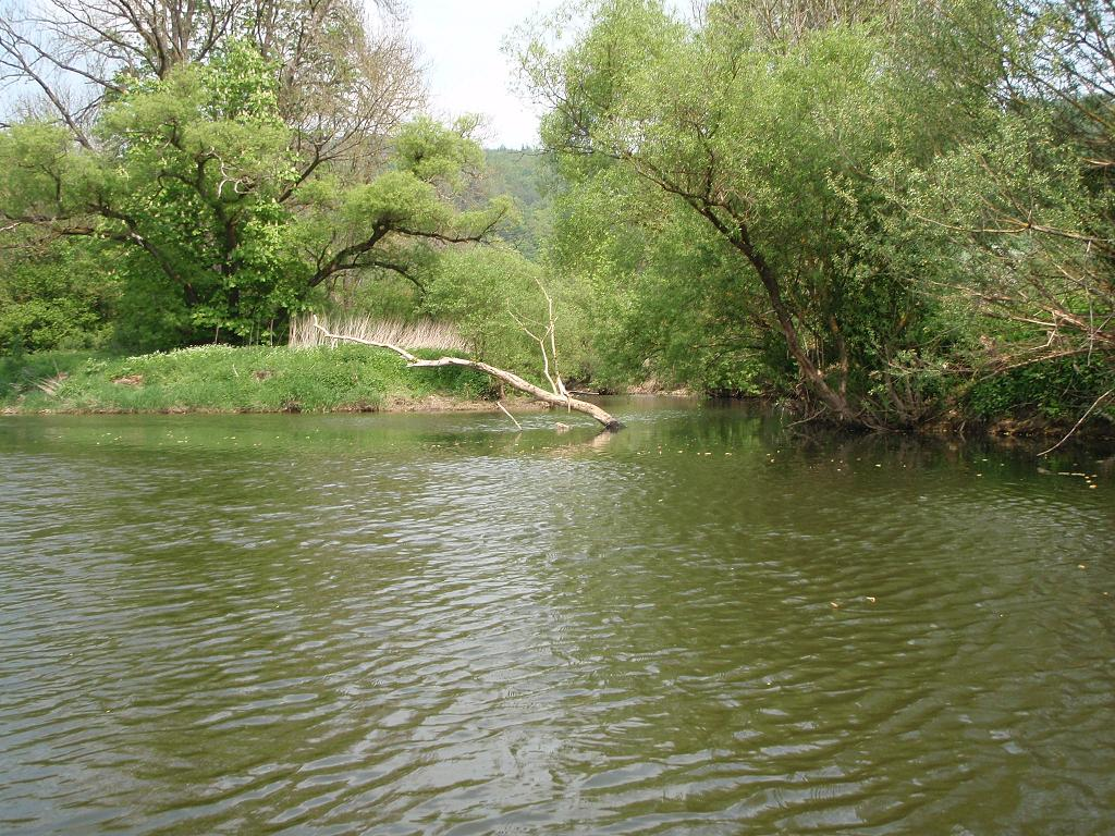 Mündung der Brettach in die Jagst. Blickrichtung in Fließrichtung der Jagst, und in das Tal der Brettach hinein.